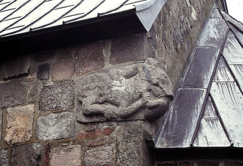 Lihme Kirke, (Skive Kommune), Korets sydmur med løve